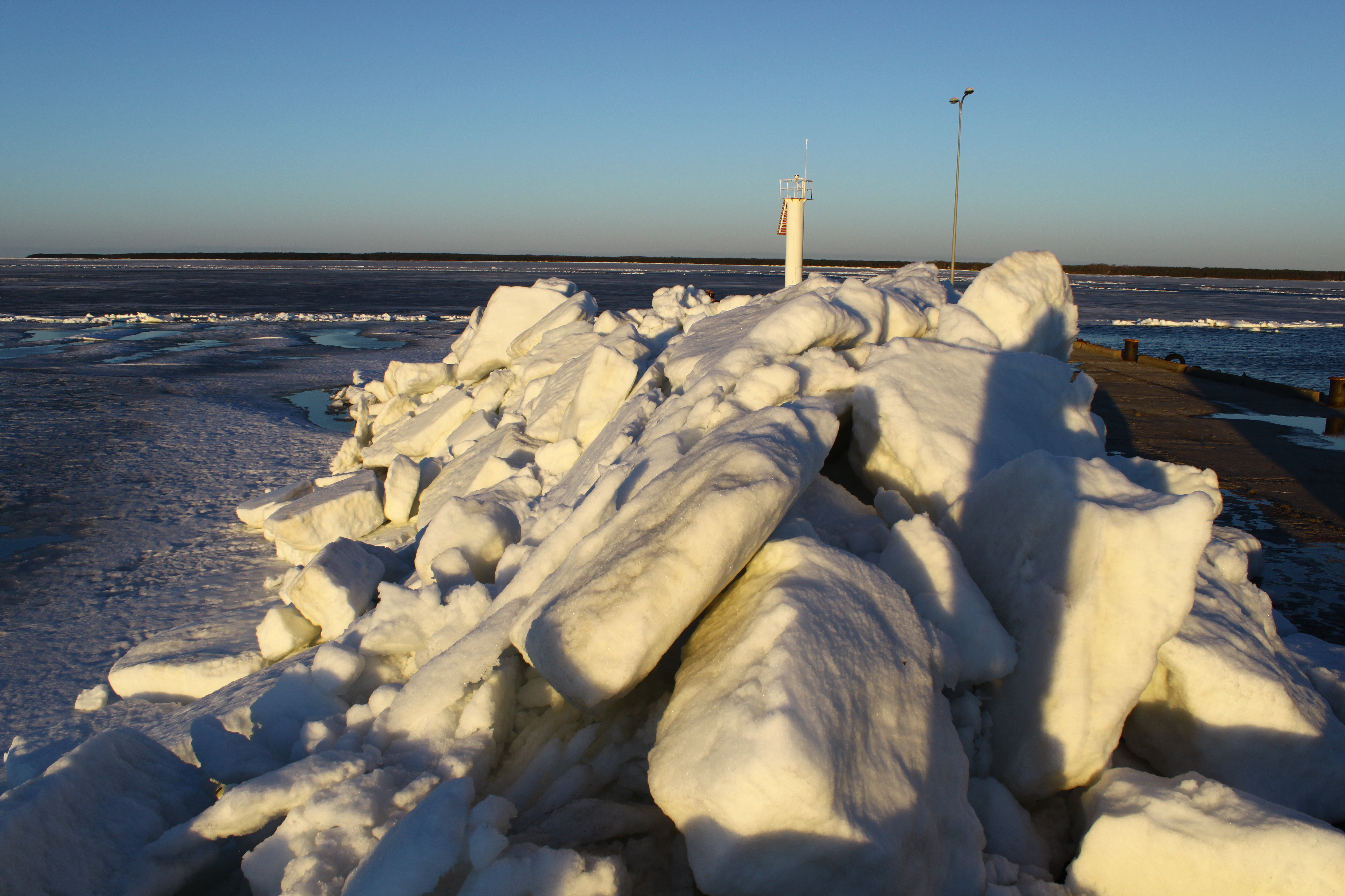 Asukoht: Triigi, Saaremaa